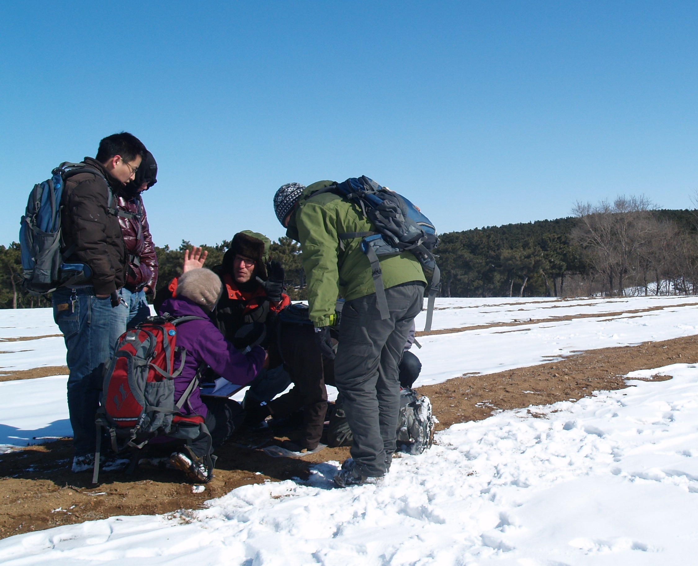 מחקר השטח בפו-סין, מרץ 2013